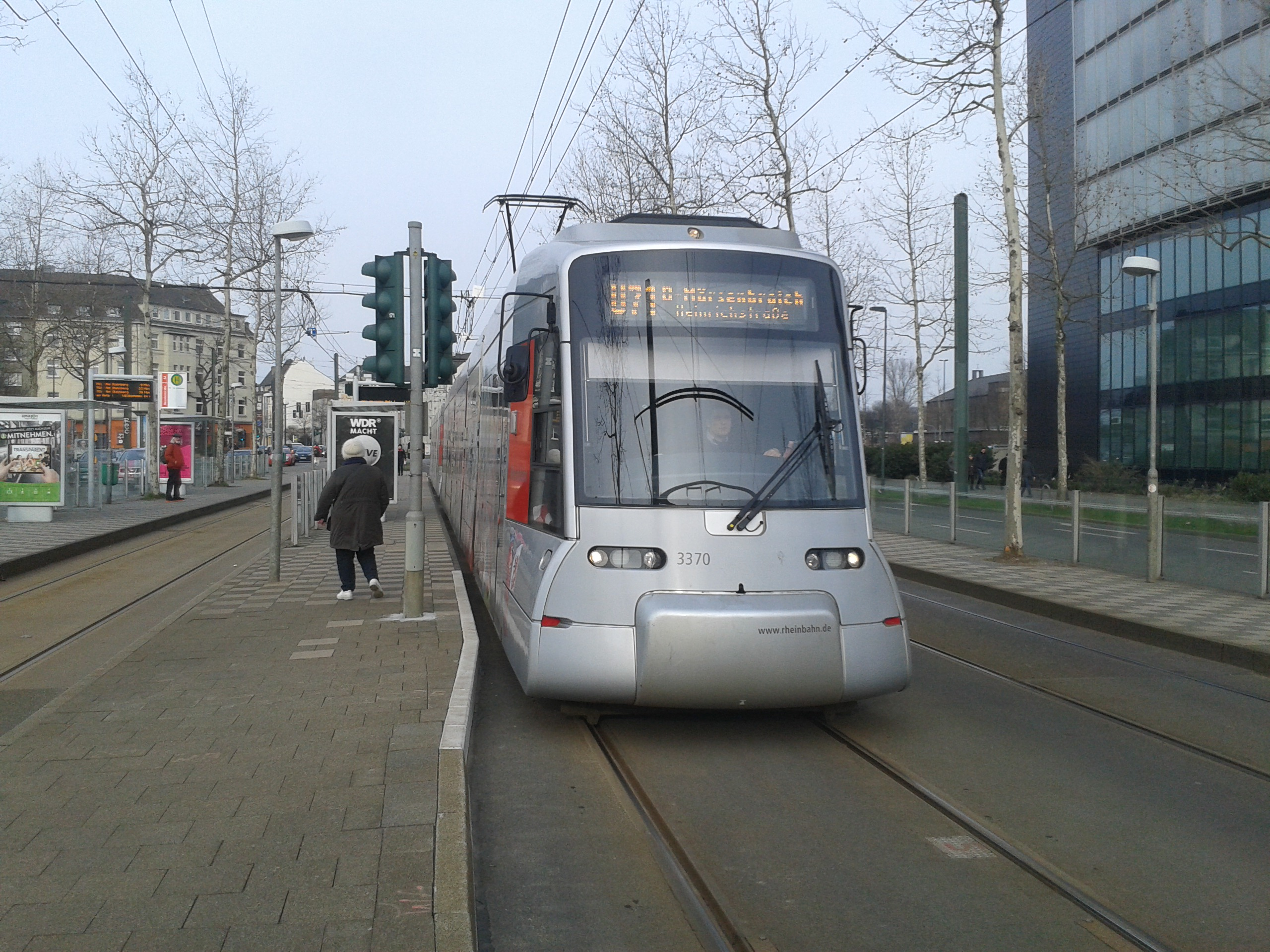 Mörsenbroich Heinrichstraße